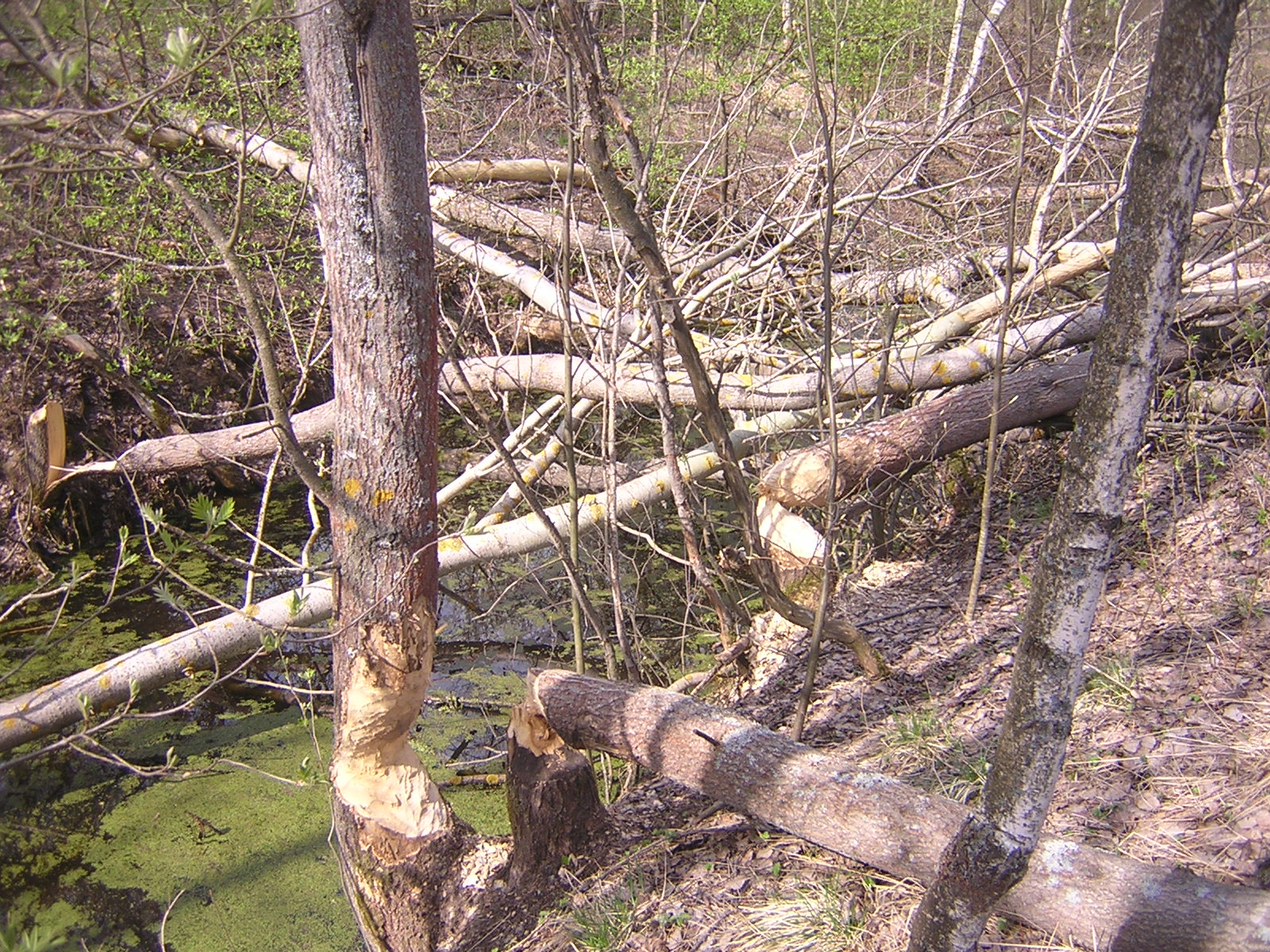 Castor fiber and Populus tremula. Russia, Ivanovo region. Осины, "бобровая столовая". Россия, Ивановская область, Савинский район.